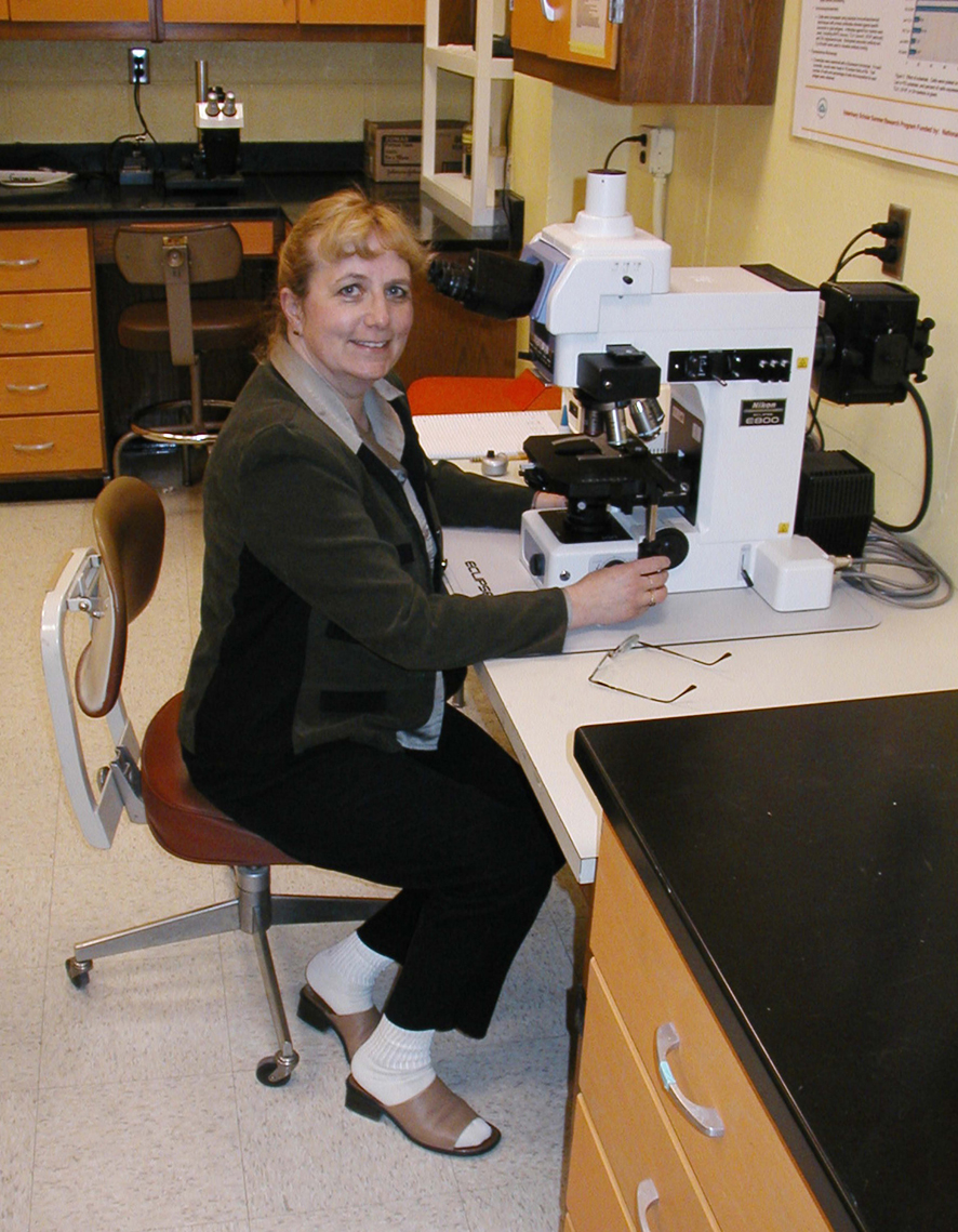 Jitka Ourednik at the microscope